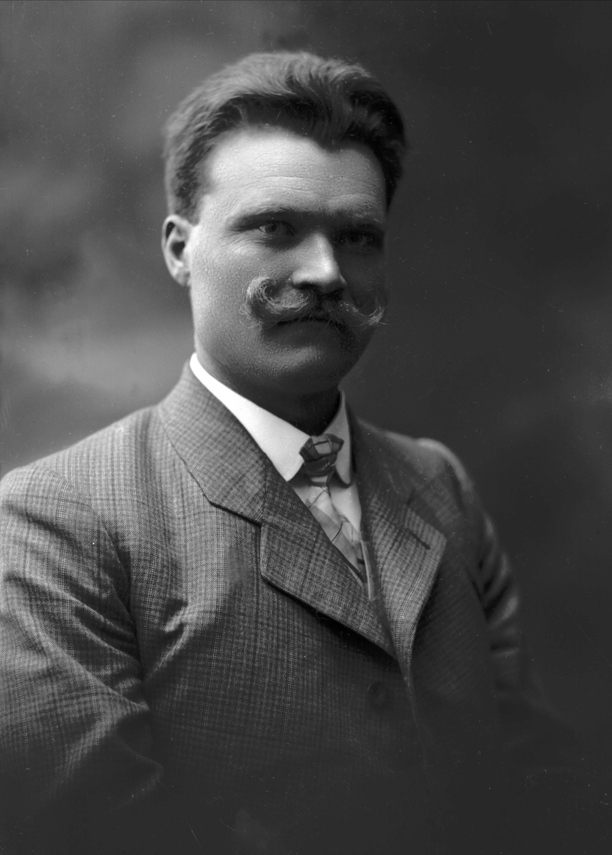 Fjærli, Olav Eysteinson by Gustav Borgen